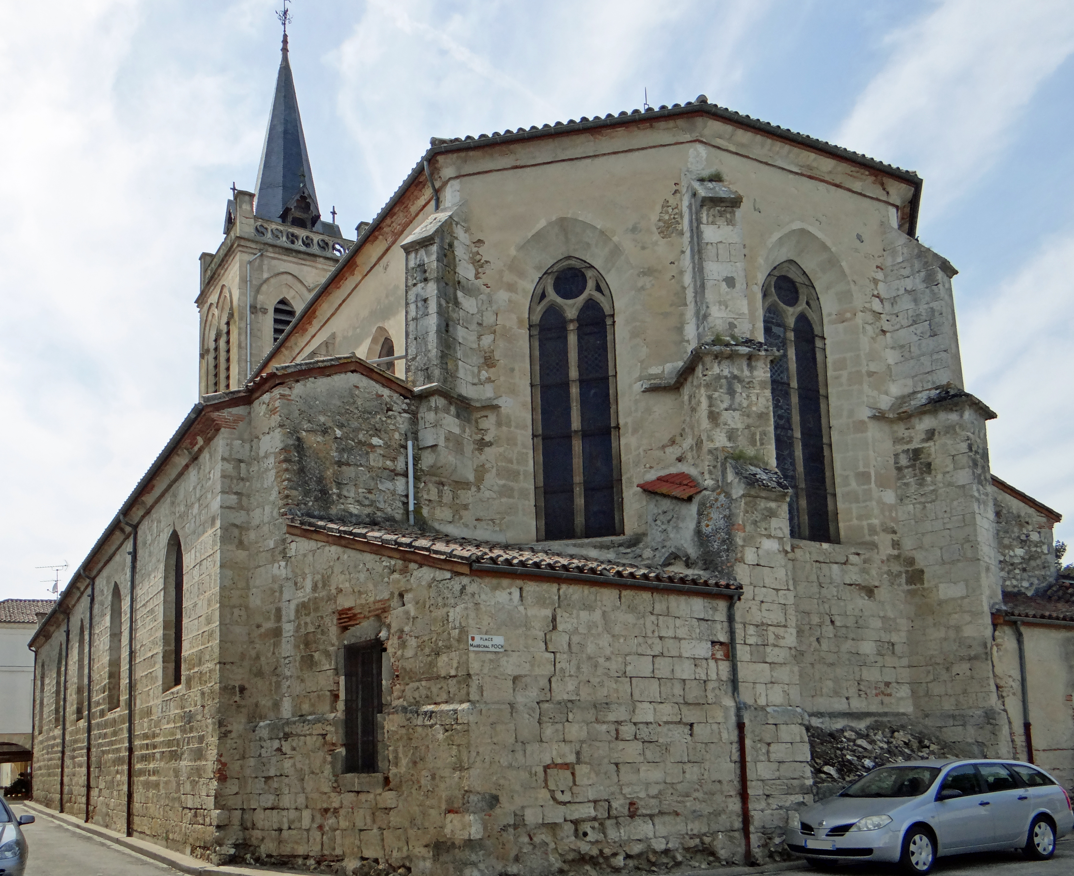 Damazan - Église Notre-Dame - Chevet